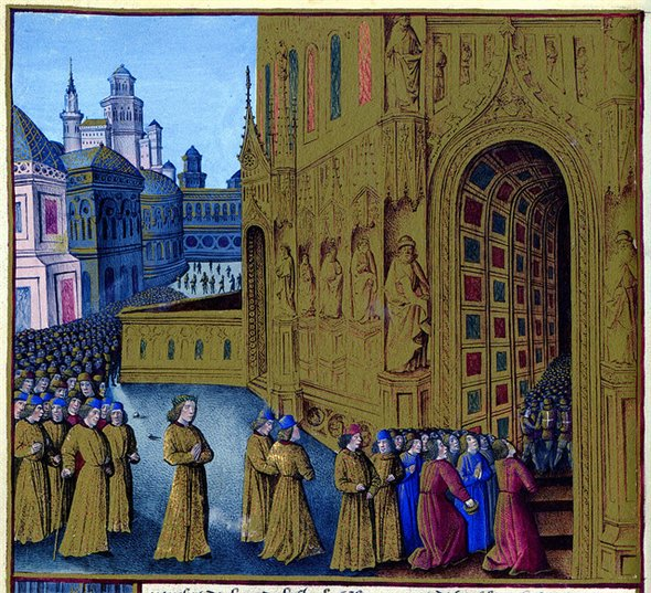 Миниатюра Жана Коломна из Хроники Крестовых походов; XV в.